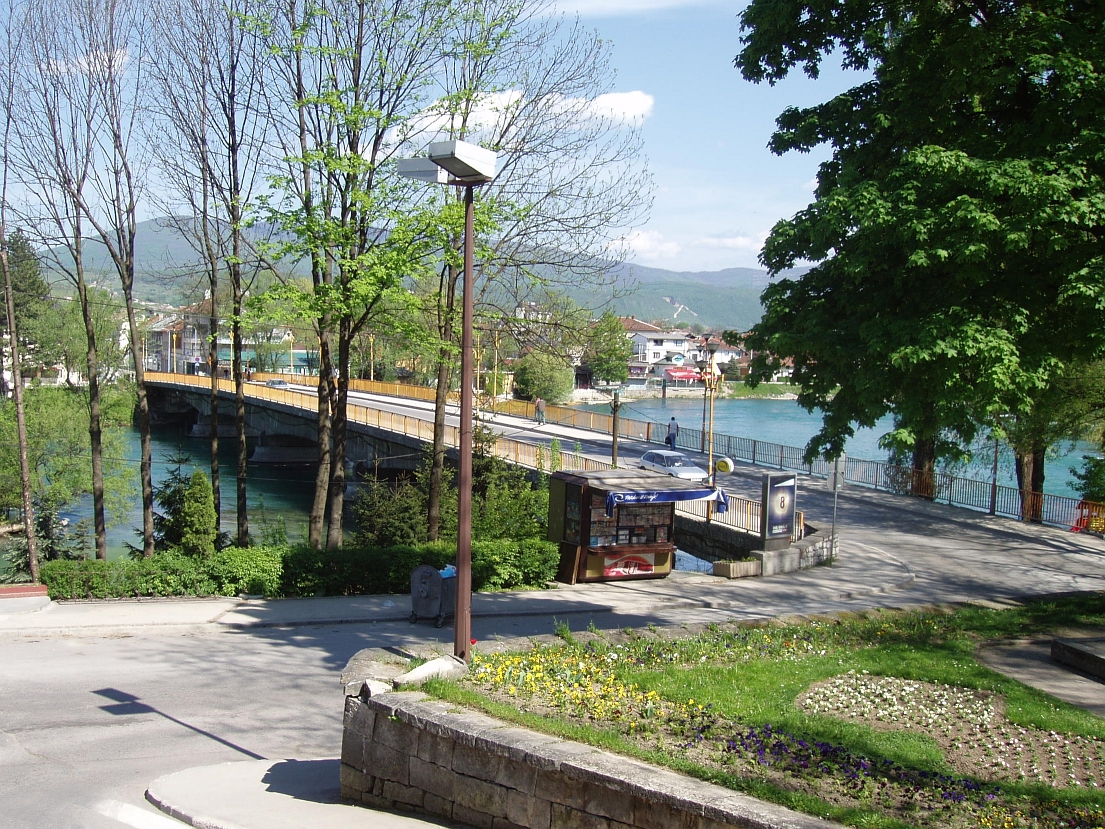 Most Oslobodilaca grada Bihaća (naziv od 1945. do rata u BiH), nakon rata preimenovan u Most Alije Izetbegovića u Bihaću